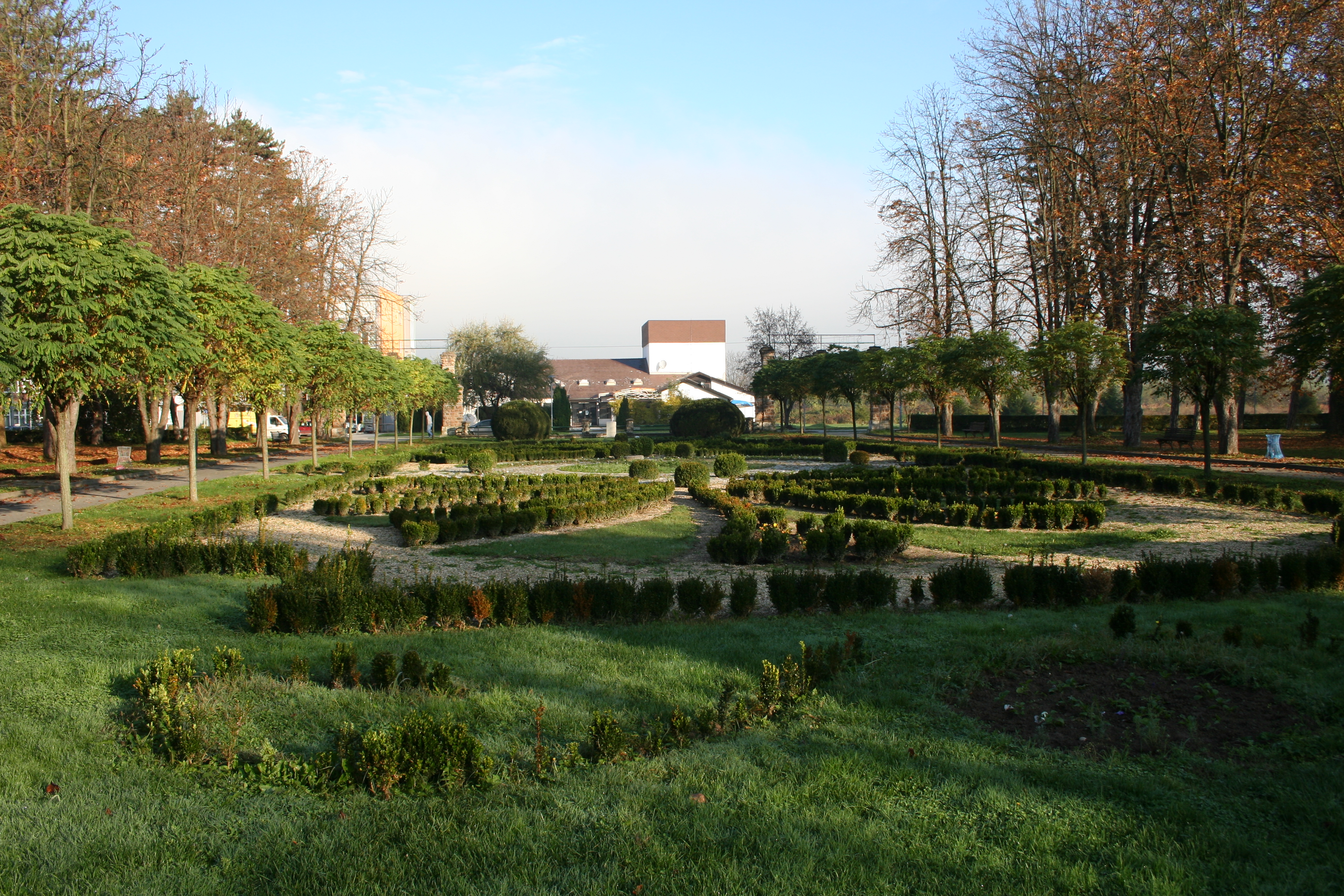 Kursalon, Banja Koviljača